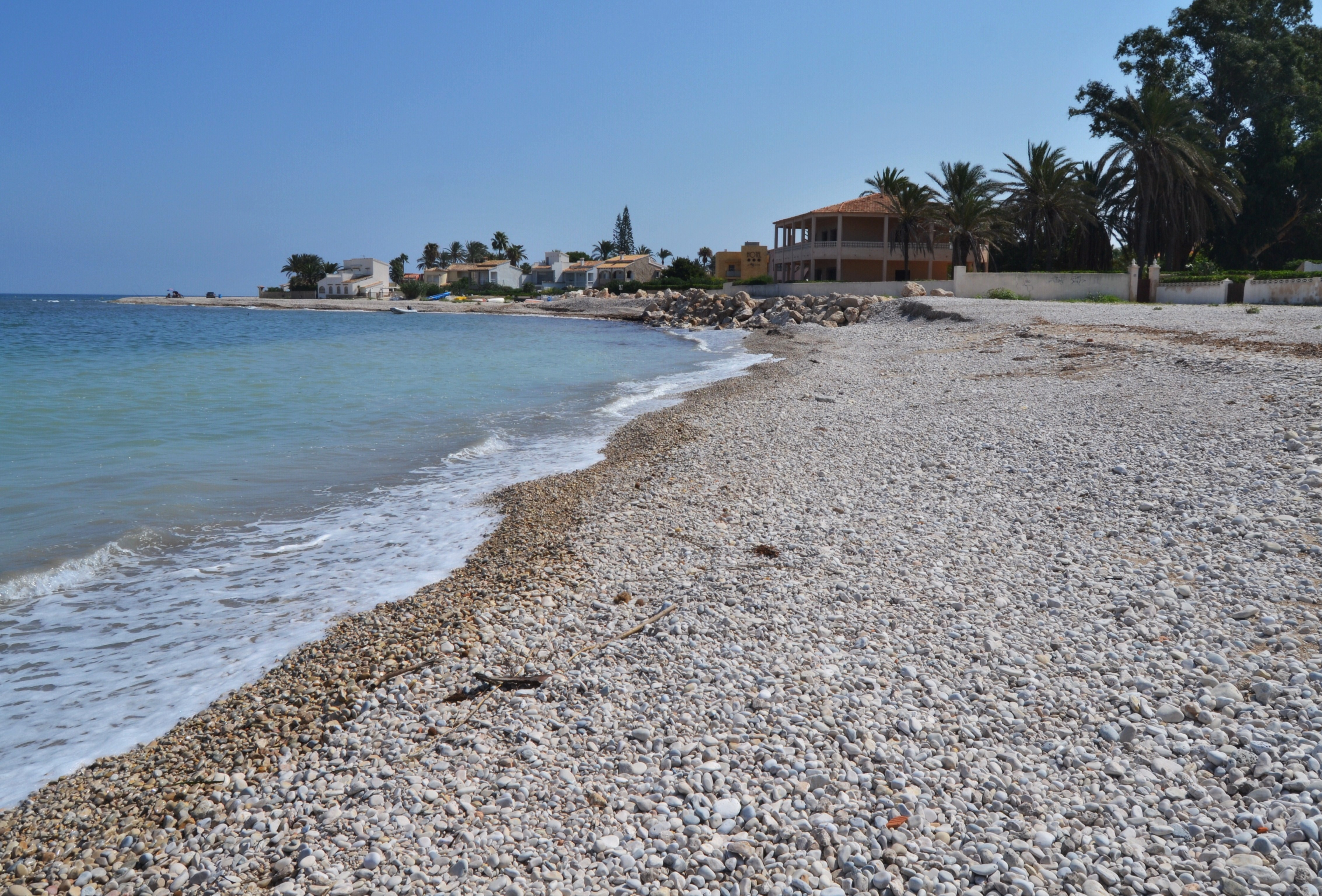 Platja de l'Almadrava amb la punta del mateix nom al fons.